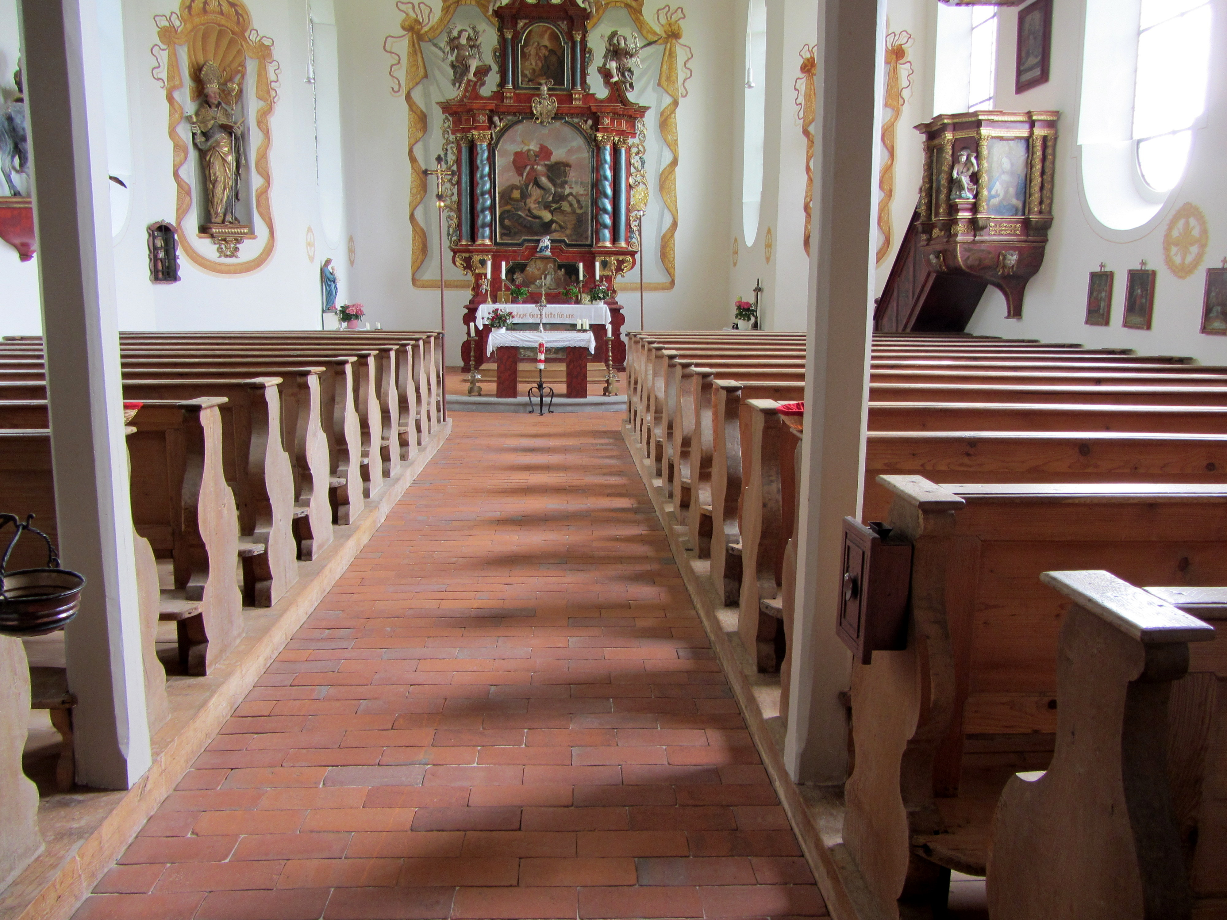 St. Georg zu Gwigg - Filialkirche der ehemaligen Reichabtei Rot an der Rot - Erbaut während der Regierungszeit von Abt Hermann Vogler